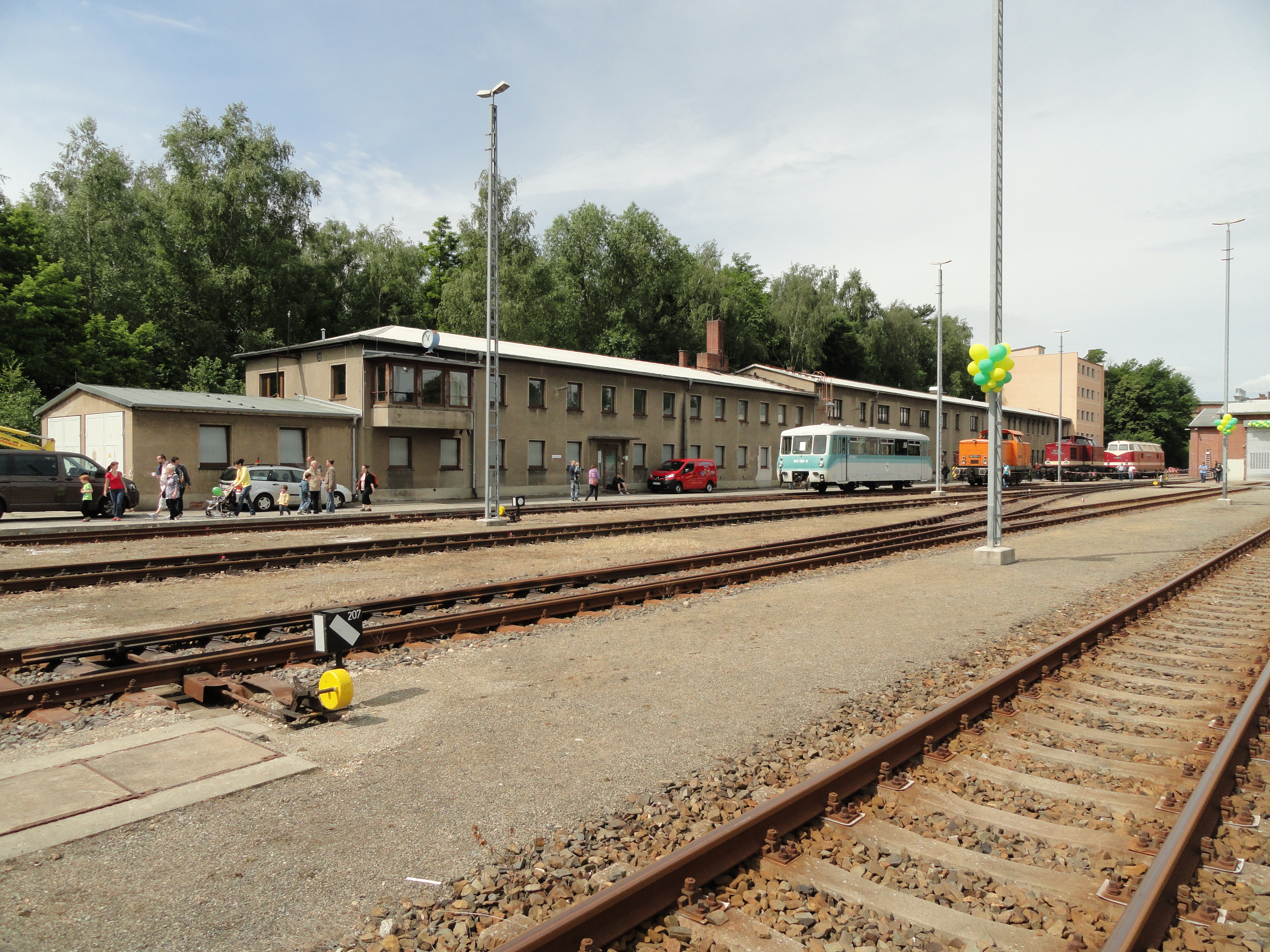 ehem. Lokleitung und Sozialgebäude des Bahnbetriebswerks Görlitz